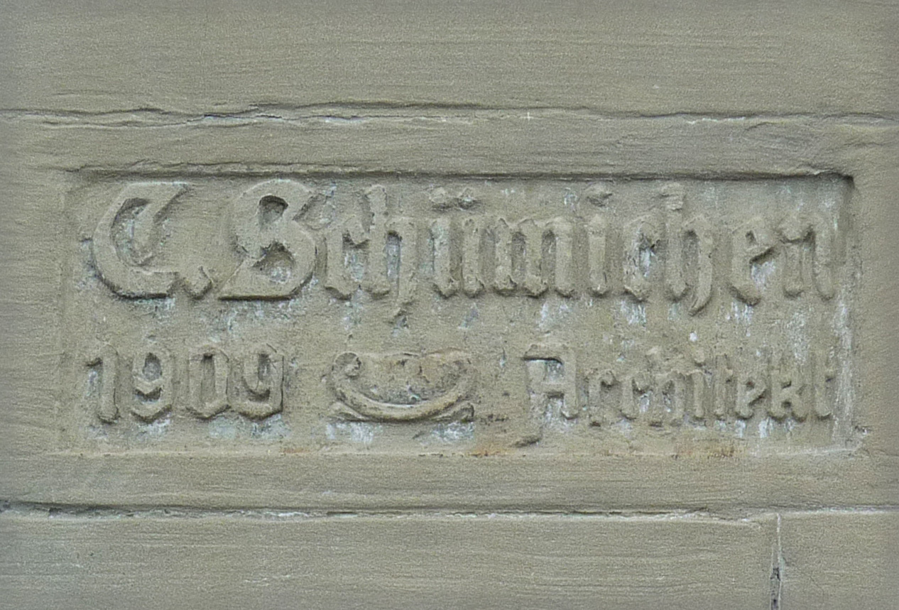 Schild des Architekten C. Schümichen (1909) am Haus Würzburger Straße 9 in Dresden-Plauen